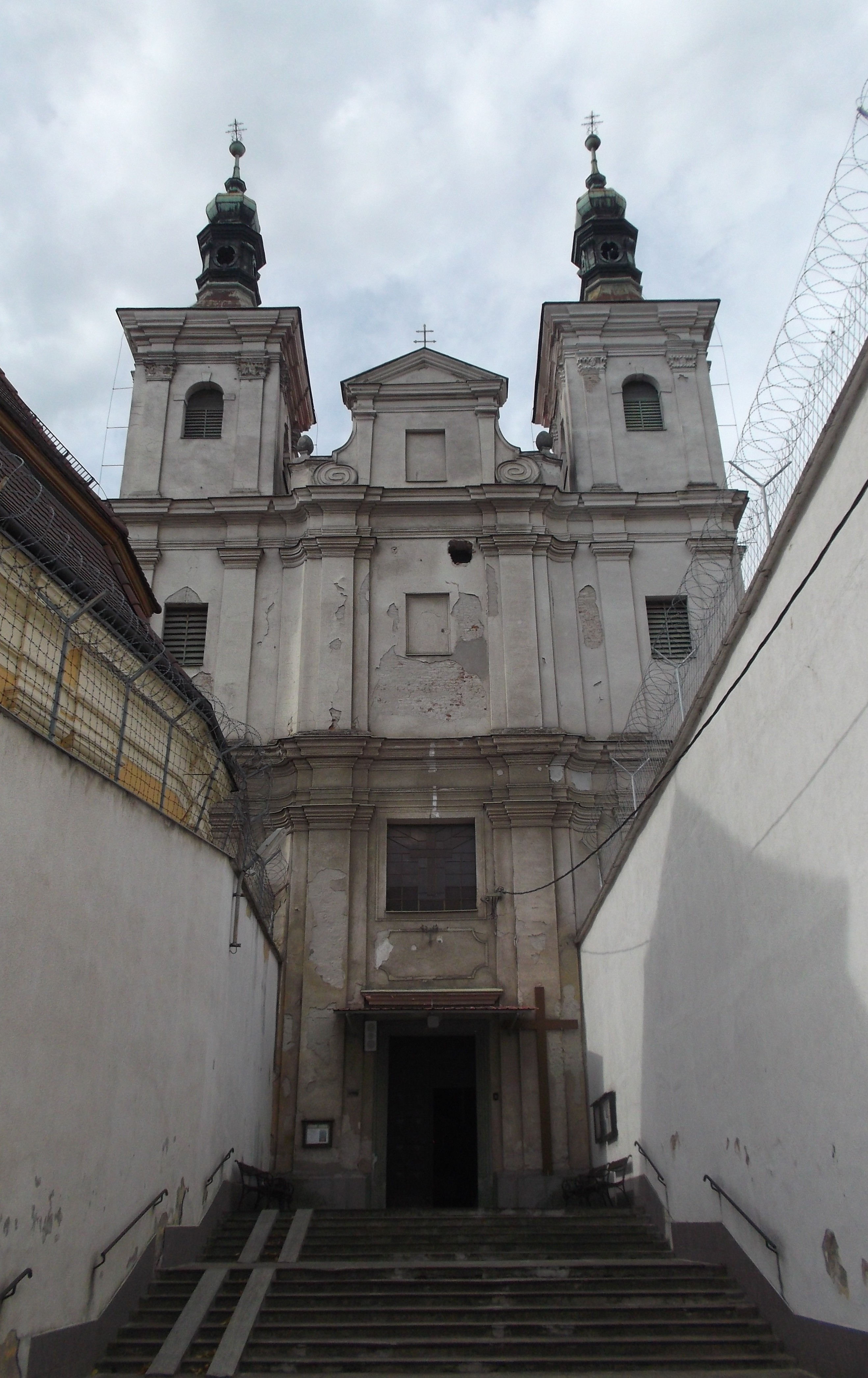 Farský kostol, trinitársky